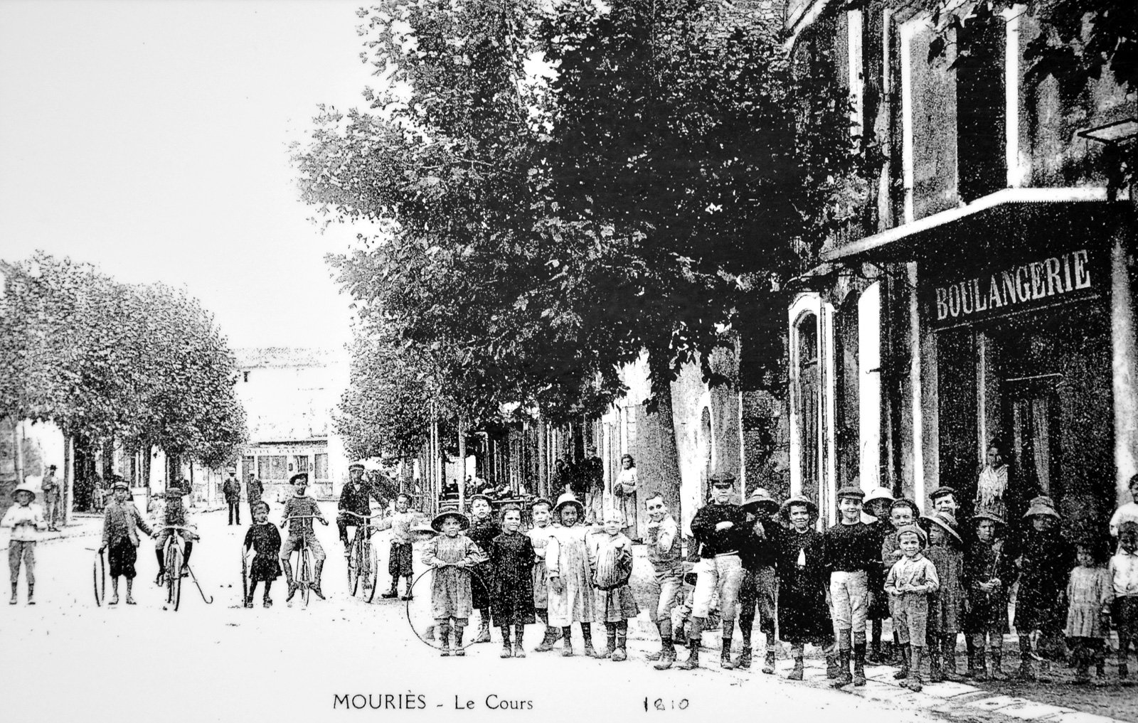 Mouriès im Jahr 1910, le Cours.